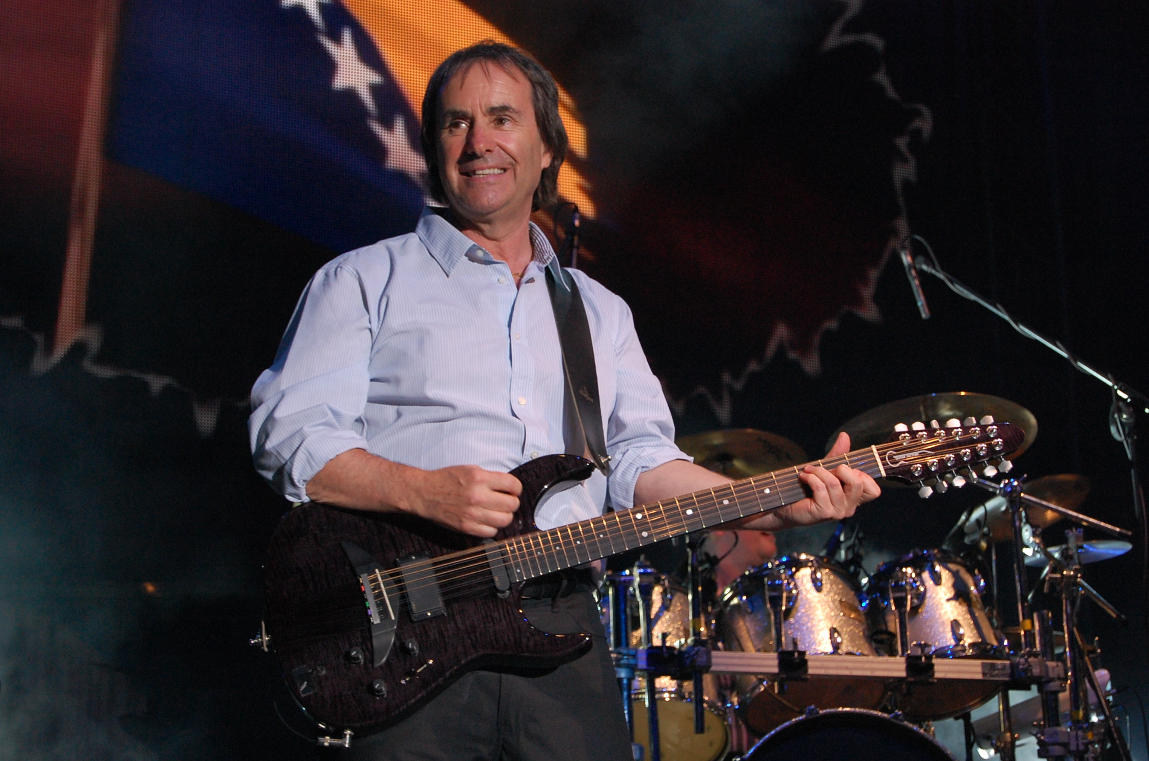 Chris de Burgh concert au Chateau de Gymnich